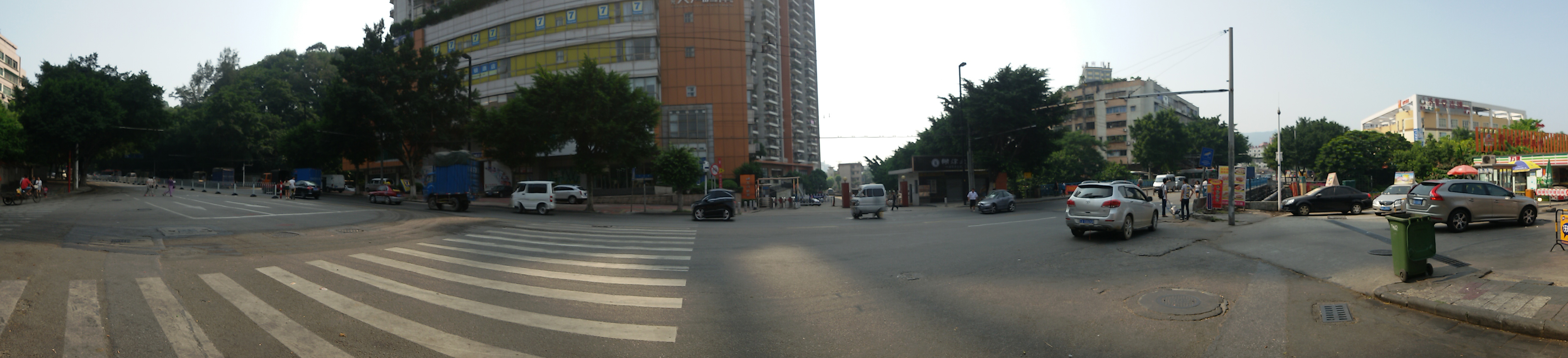 粵語: 天河區興華路嘅全景